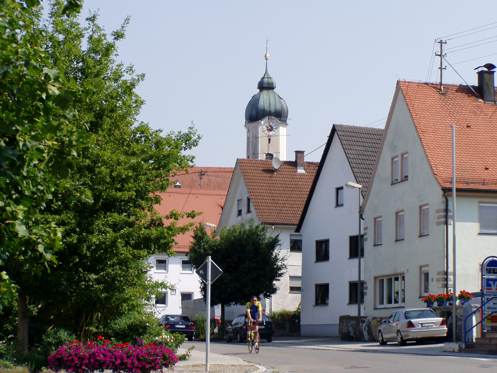 Buch, Lkr Neu-Ulm